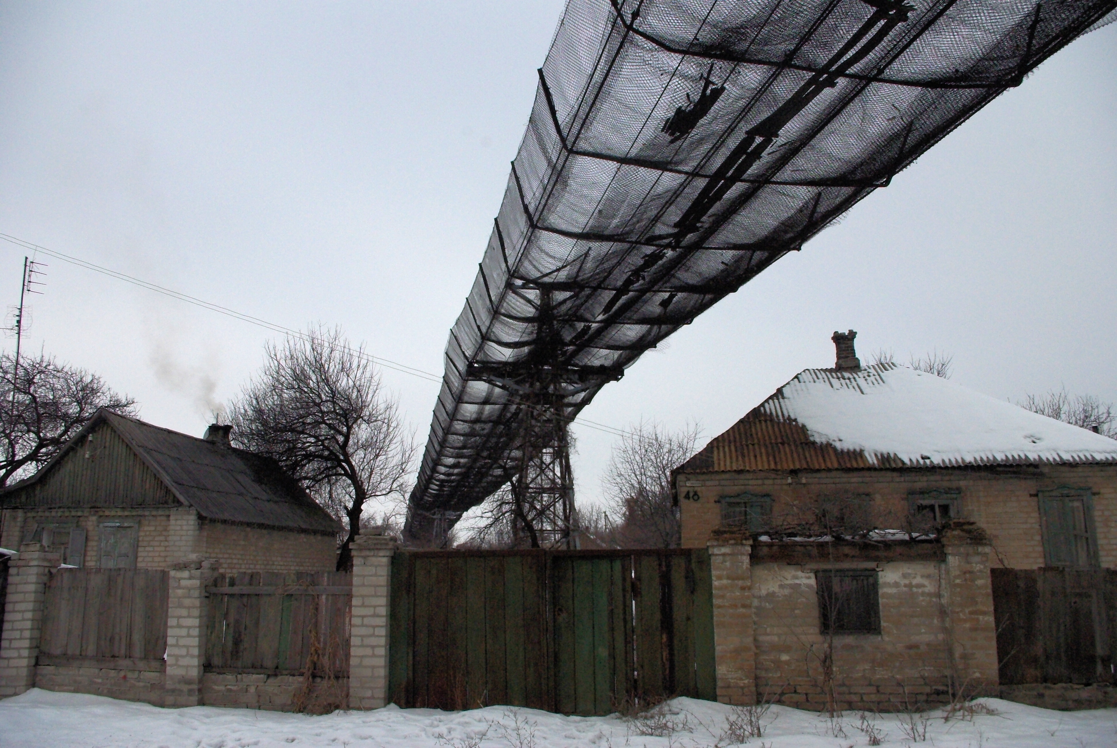 Вид на лисичанскую ВКД